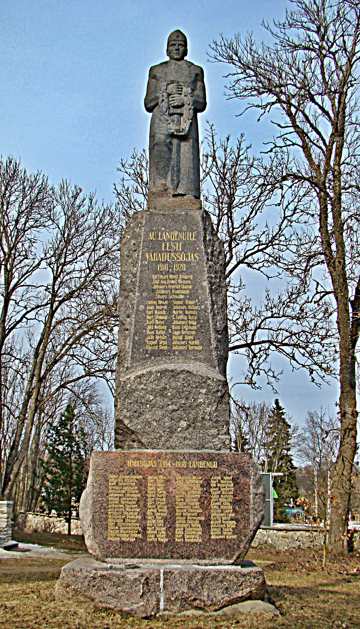 Vabadussõja mälestussammas Jüri alevikus